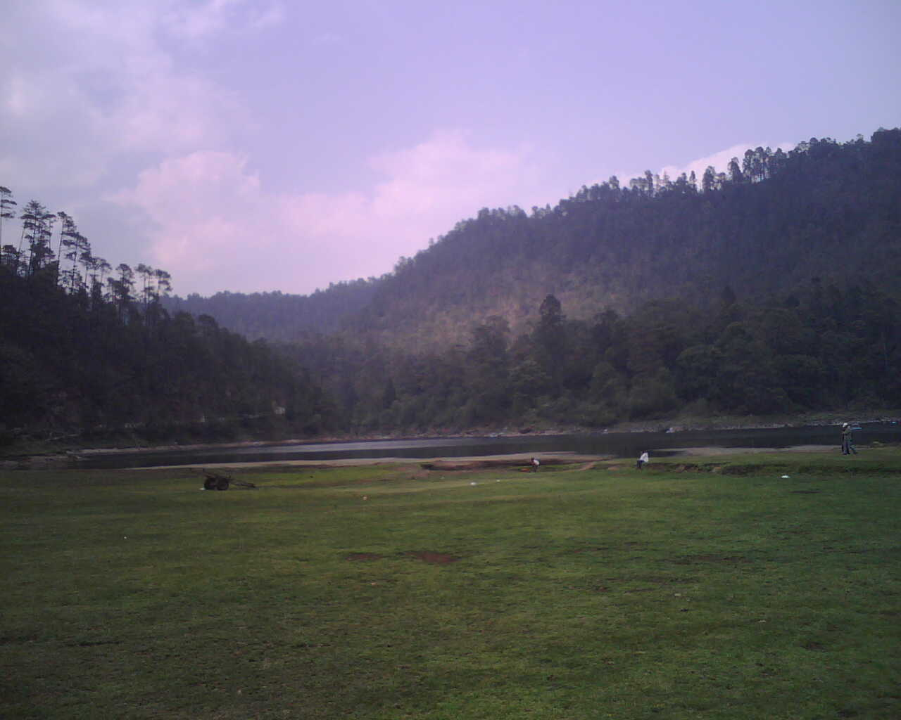 Picture of La Laguna de Zempoala